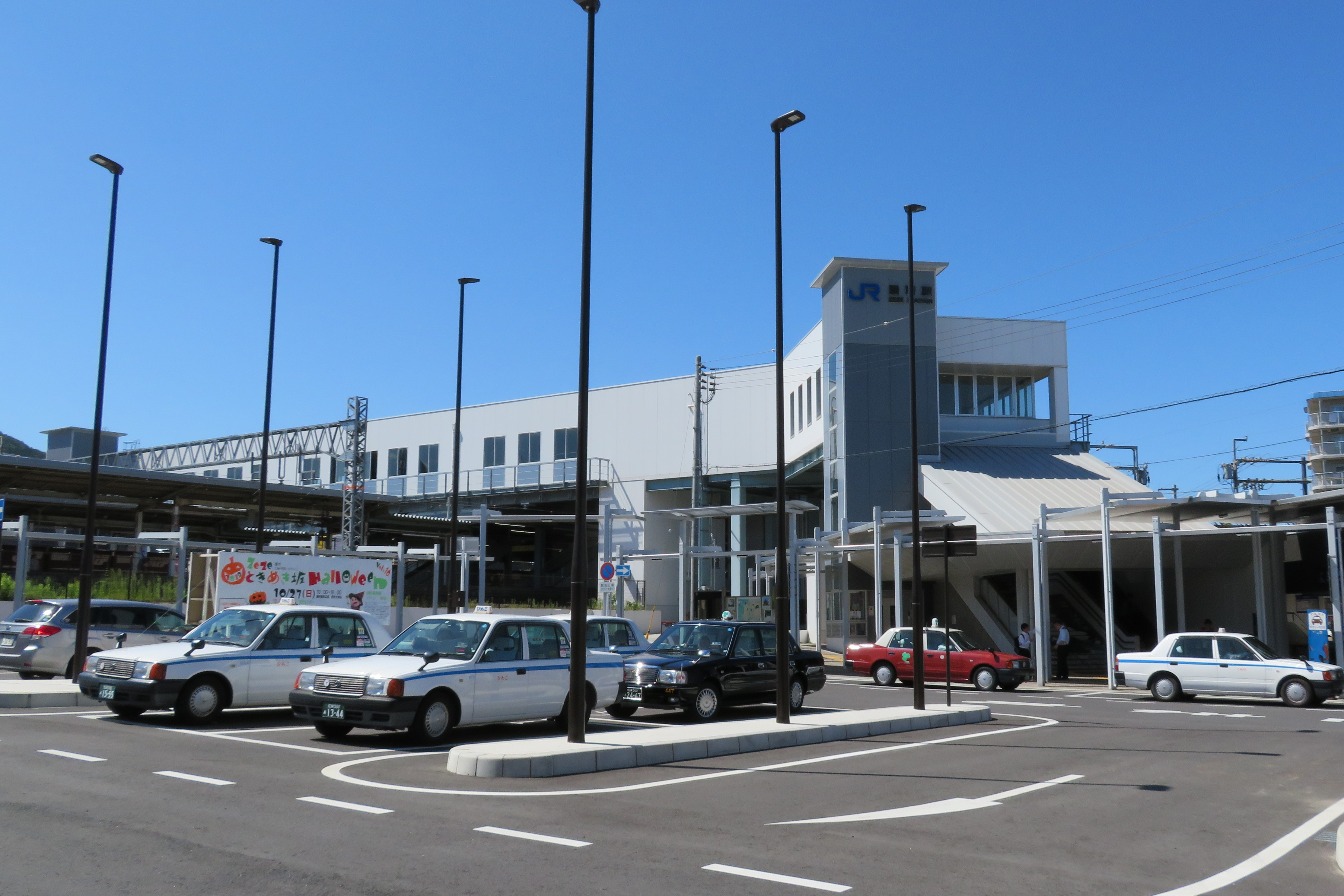 JR膳所駅北口